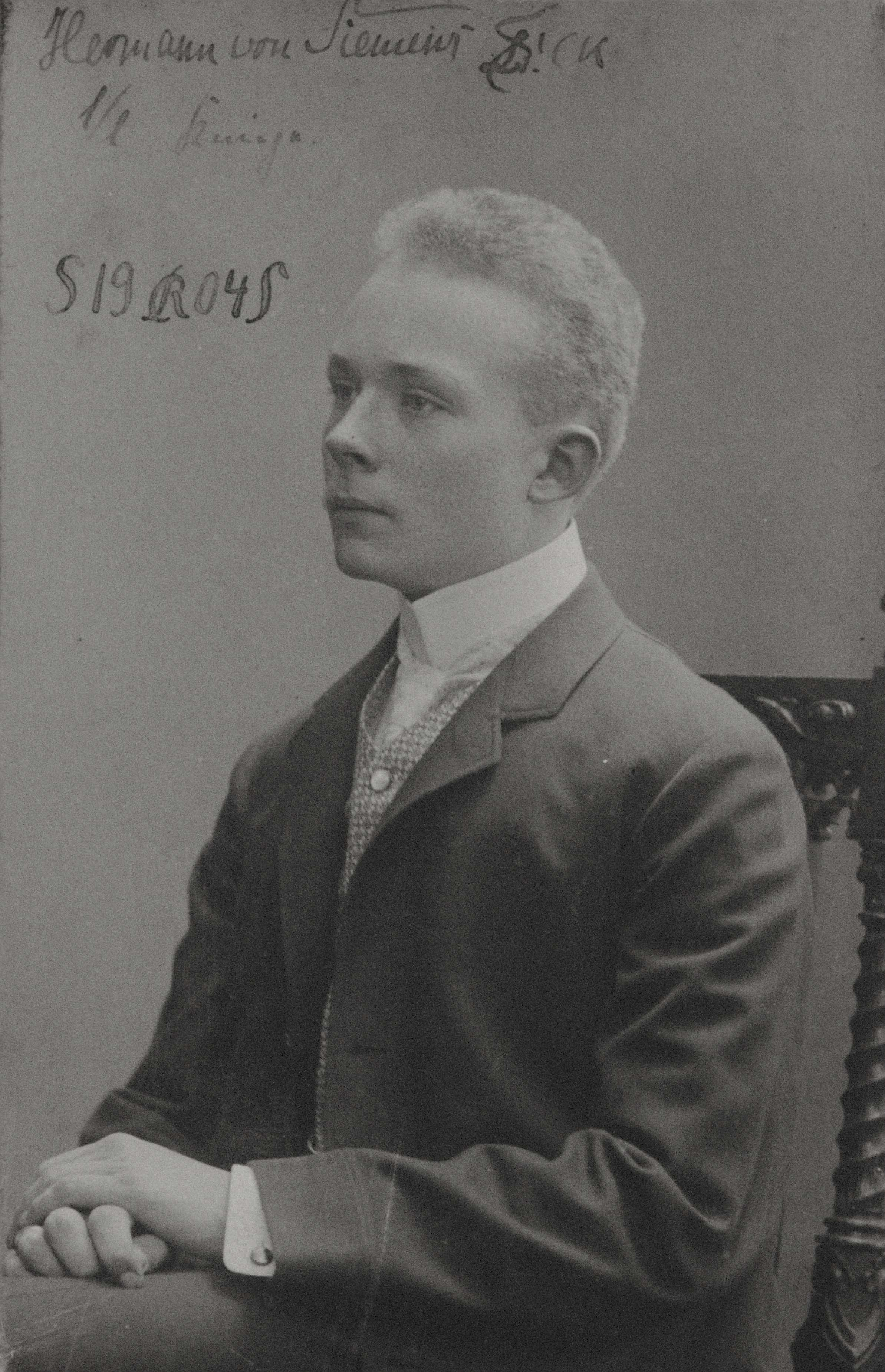 Fotografie von Hermann von Siemens als Mitglied der Studentenverbindung Leonensia in Heidelberg. Standort: Ahnengalerie im Conventssaal der Verbindung Leonensia. Beschreibung: Oben steht "Hermann von Siemens, Verbindungszirkel!, C[on]K[neipant] / s[einer]/l[ieben] Leonensia". In der oberen Bildmitte steht "S[ommer] 19 R[uperto Carola] 04 S[emester]"